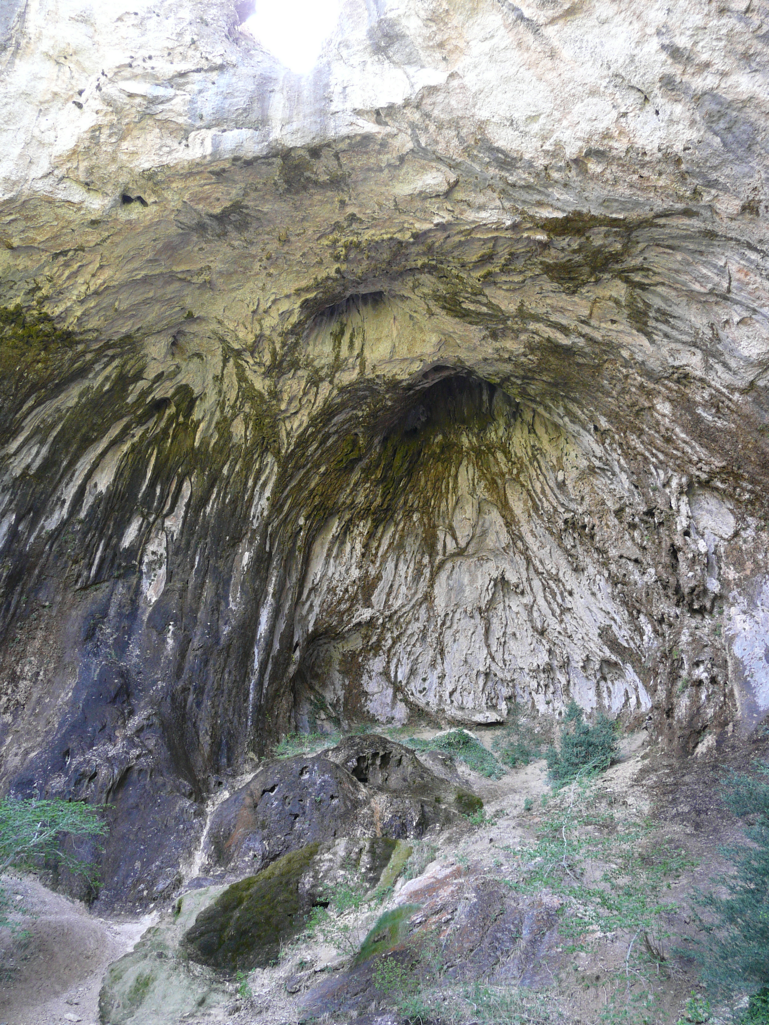 Muntanyes de Prades (Baix Camp, Conca de Barberà, Alt Camp, Priorat, Garrigues) (Montblanc, Vimbodí, Mont-ral i altres). This is a a photo of a natural area in Catalonia, Spain, with id: ES510143 Object location41° 18′ 36″ N, 1° 01′ 48″ E